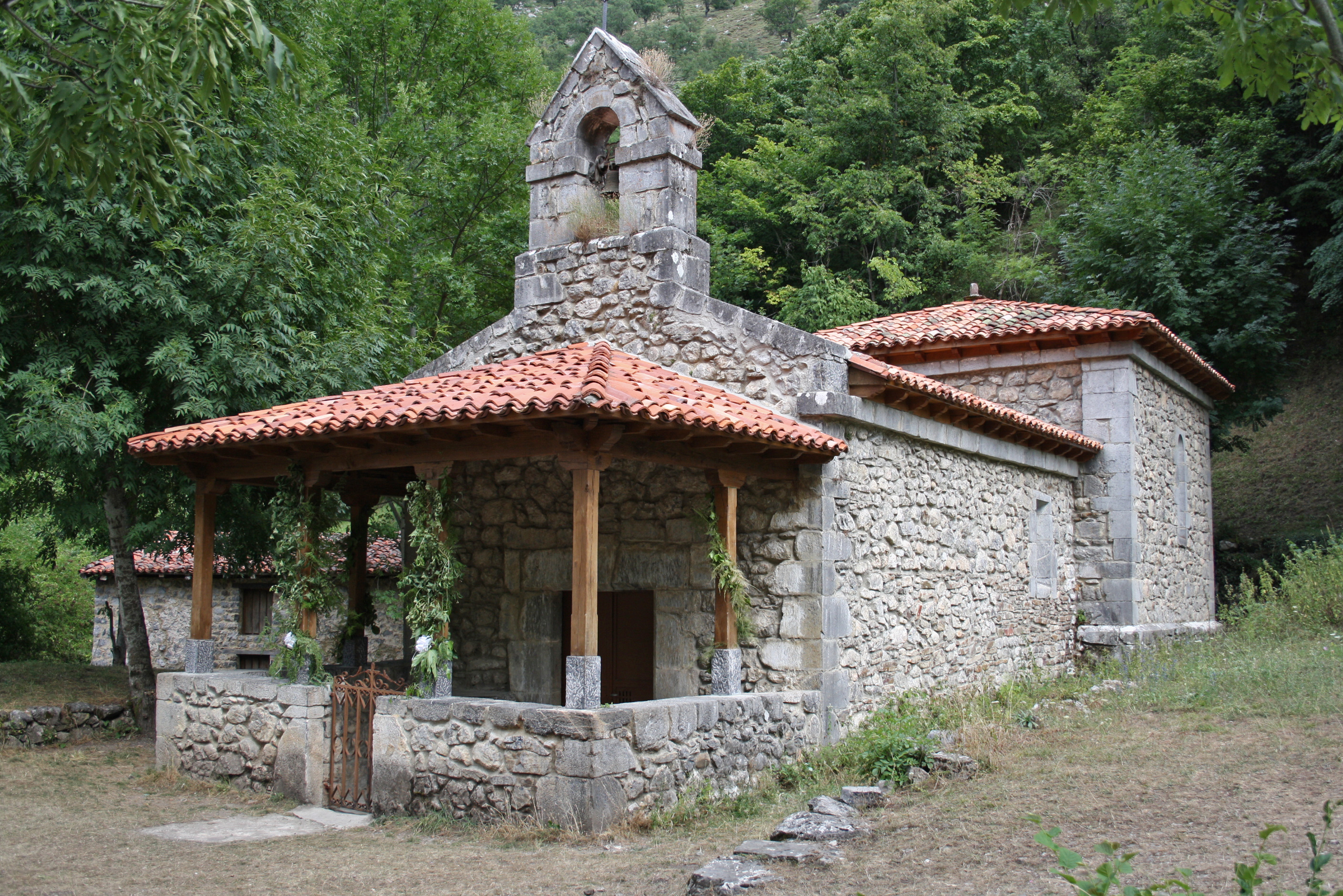 Se encuentra en el Valle de Valdeón, León (España).